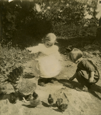 Else og Margarete Corneliussen som mater kyllinger, fotografert av faren Ragnar Corneliussen i 1917